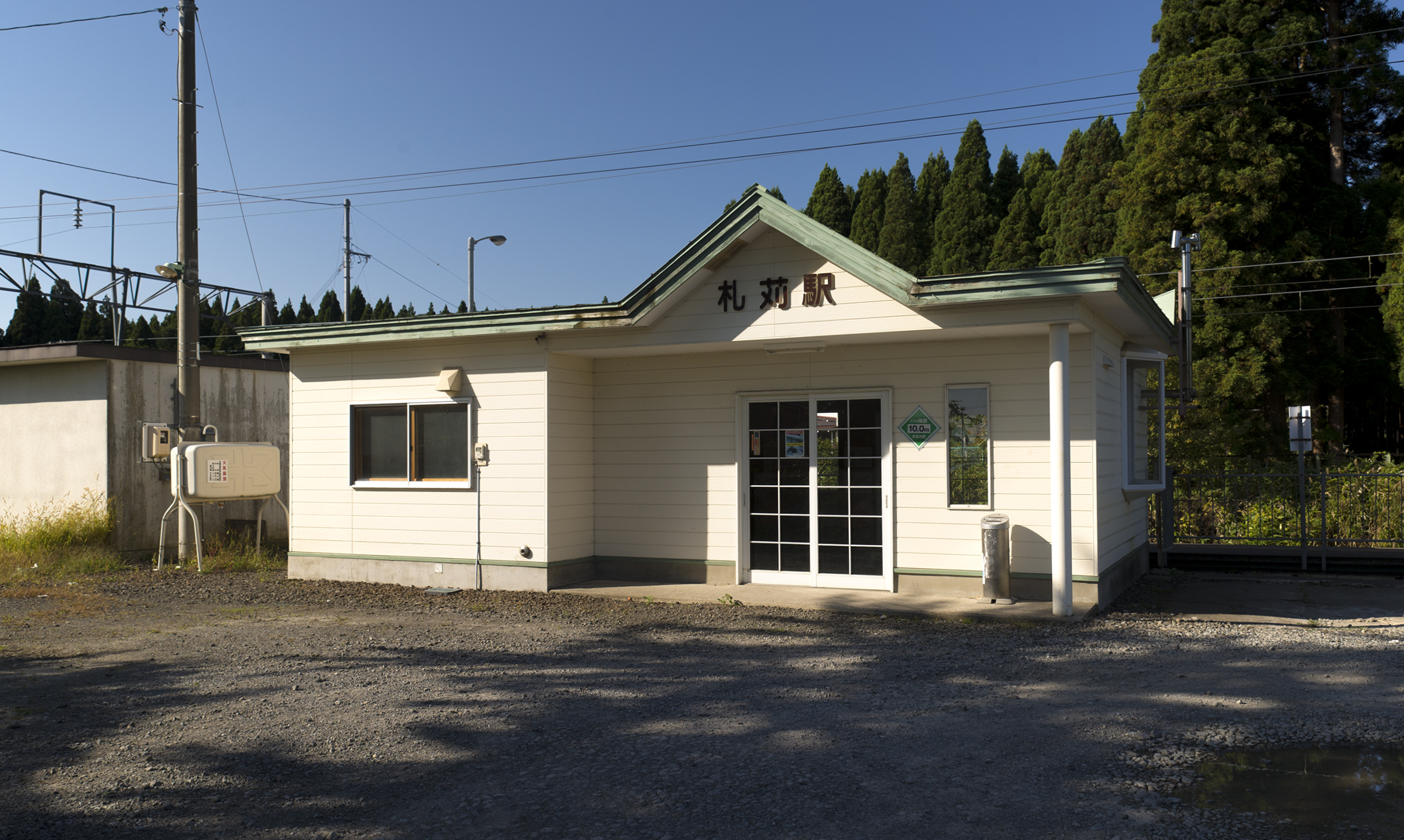 北海道旅客鉄道株式会社江差線札苅駅駅舎